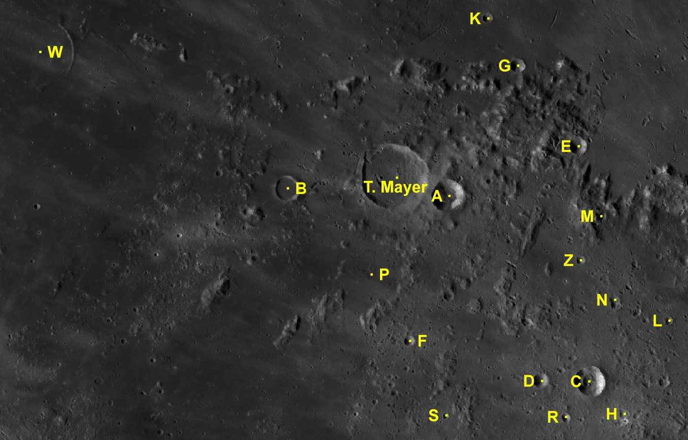 Cráter lunar T. Mayer. Cráteres satélite. (Imagen LRO)